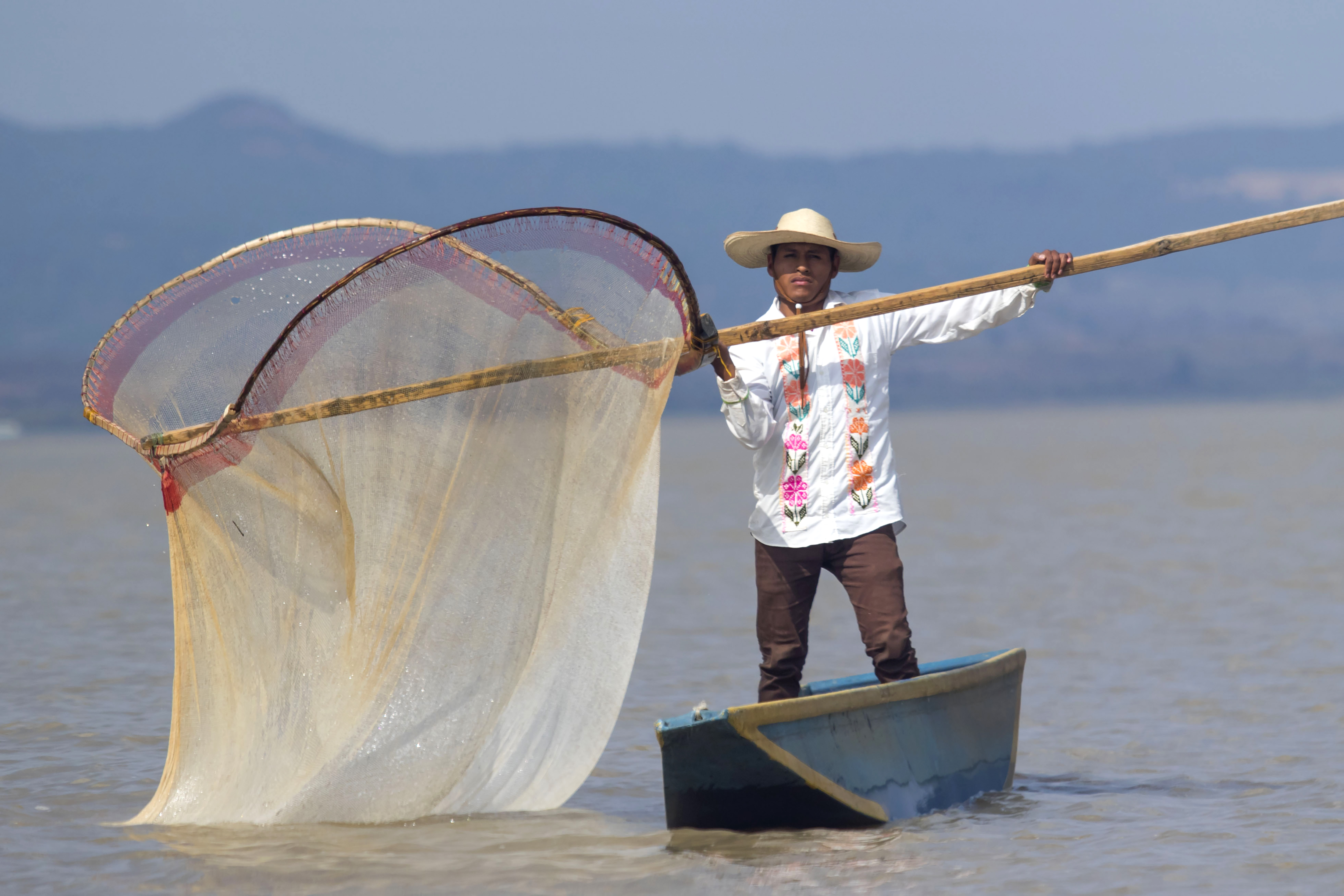 Un pescador de Janitzio extiende su red en el lago de Páztcuaro en el Estadio de Michoacán, México.